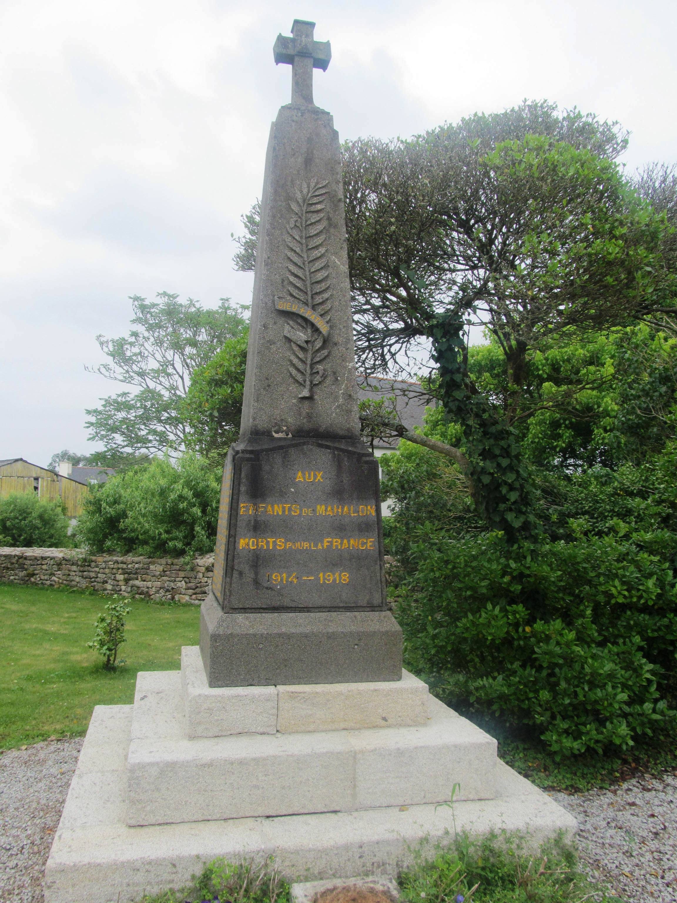 Památník padlým v I. světové válce v Mahalonu